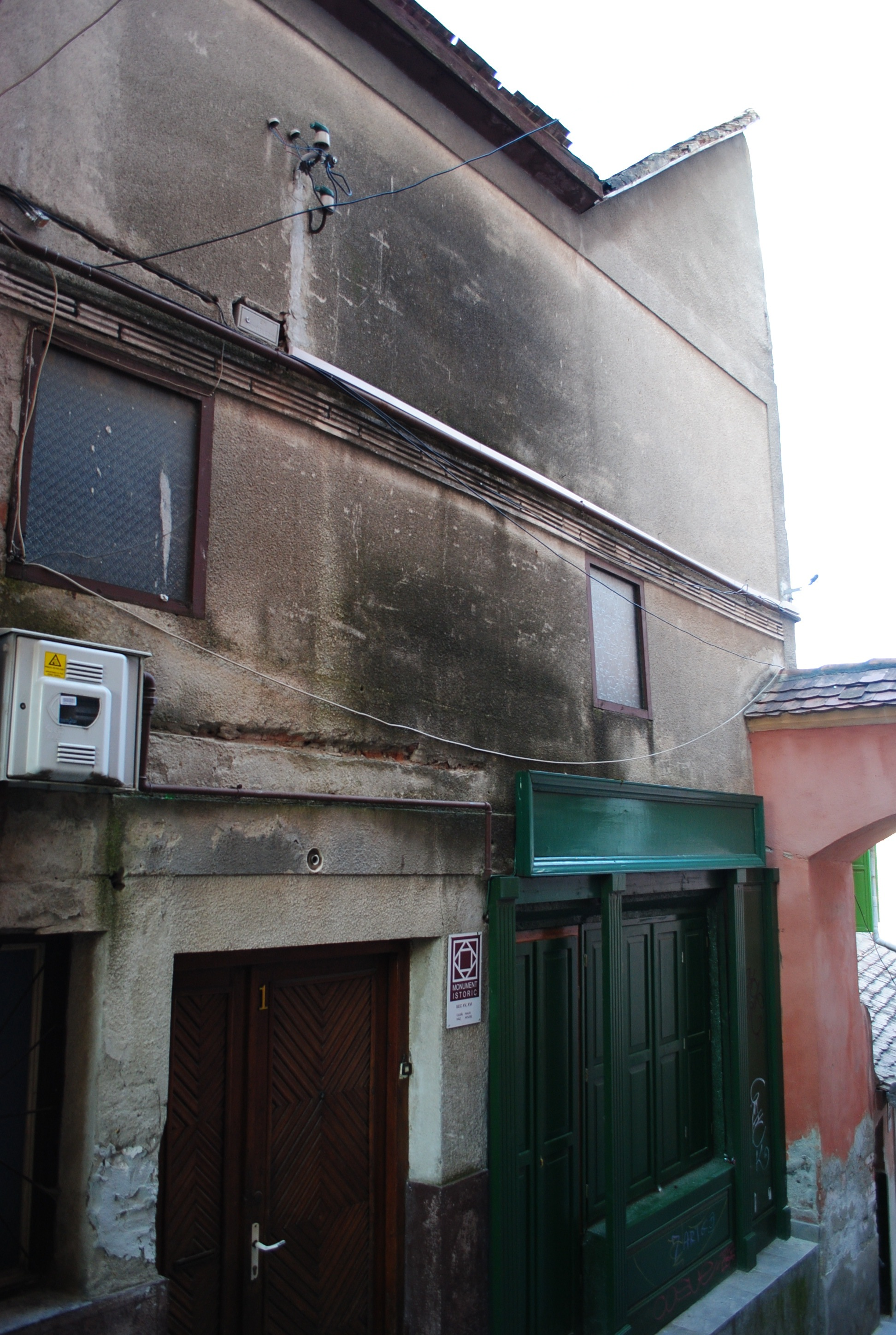 Casă, a doua jum. a sec. XV,1567